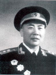 曾思玉将军1955年受勋照